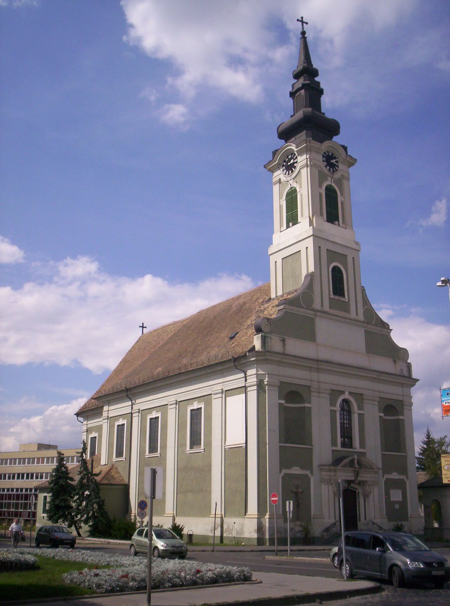 A Szent Péter és Szent Pál tiszteletére emelt templom Baján. Építtette Grassalkovich Antal 1765-ben – photo taken by uploader User:Csanády in 2006.